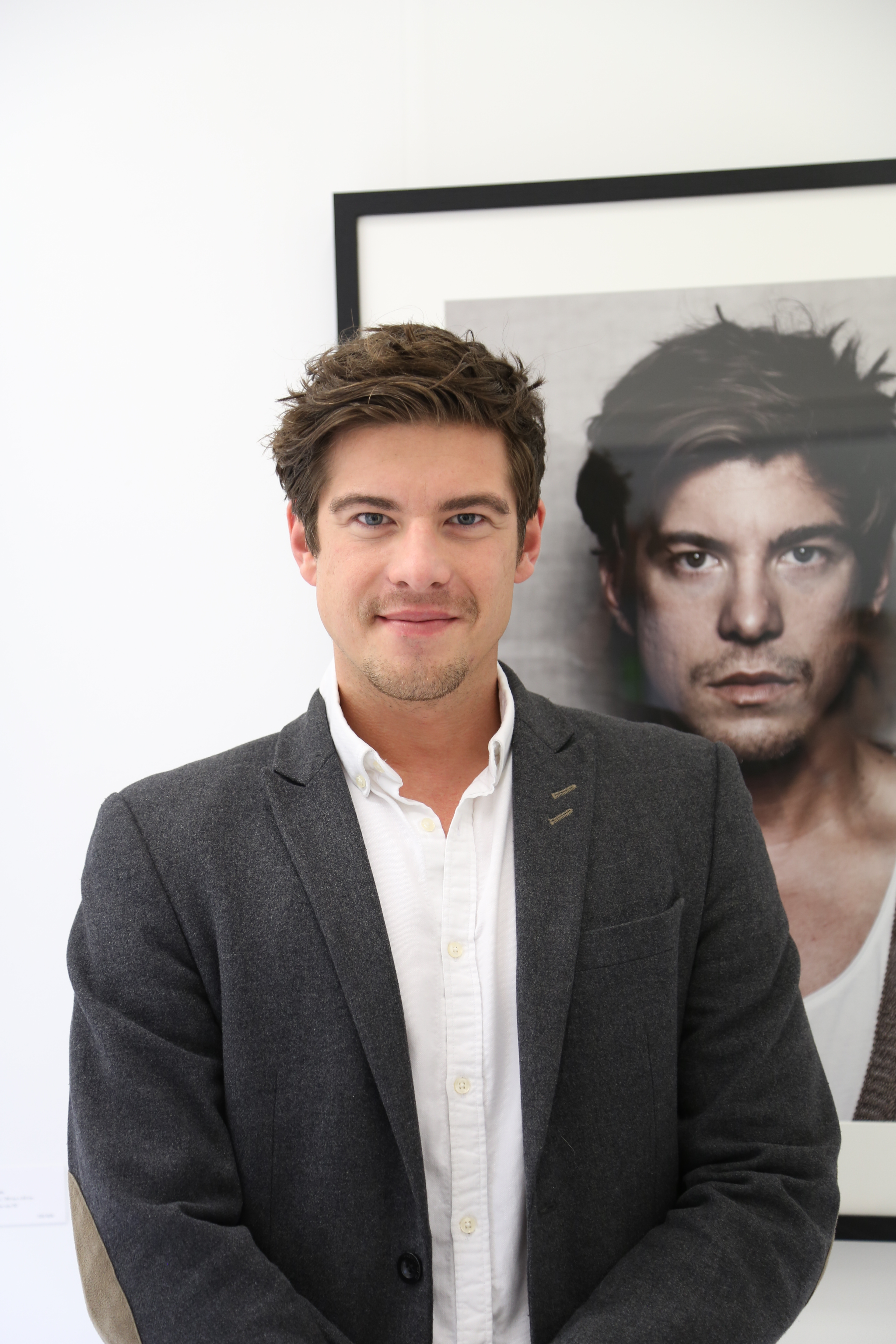 Philipp Danne bei der Eröffnung von Carsten Sanders Galerie "Heimat" am 13.05.2017 in Düsseldorf.